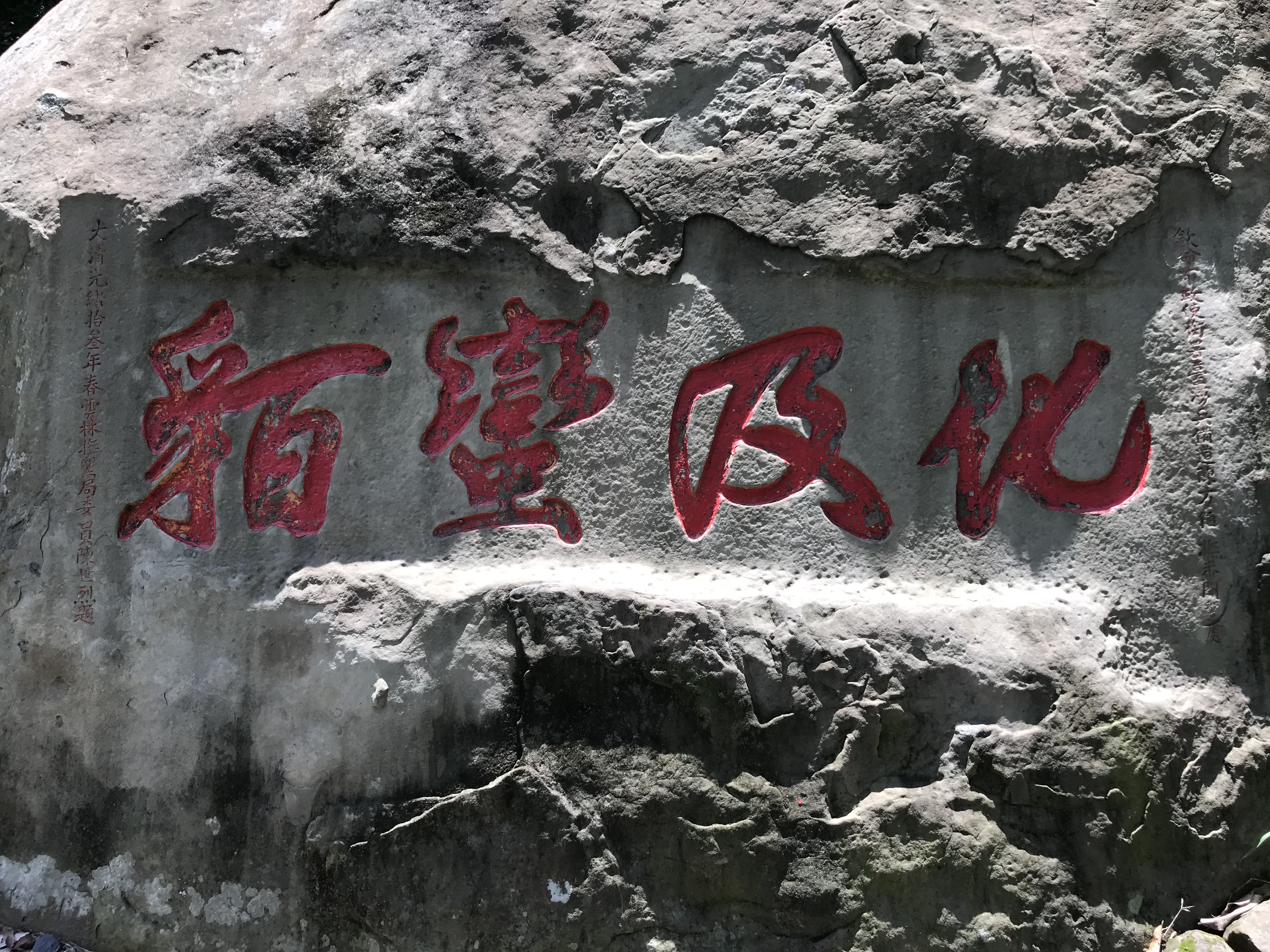 中文（台灣）: 化及蠻貊碣近景